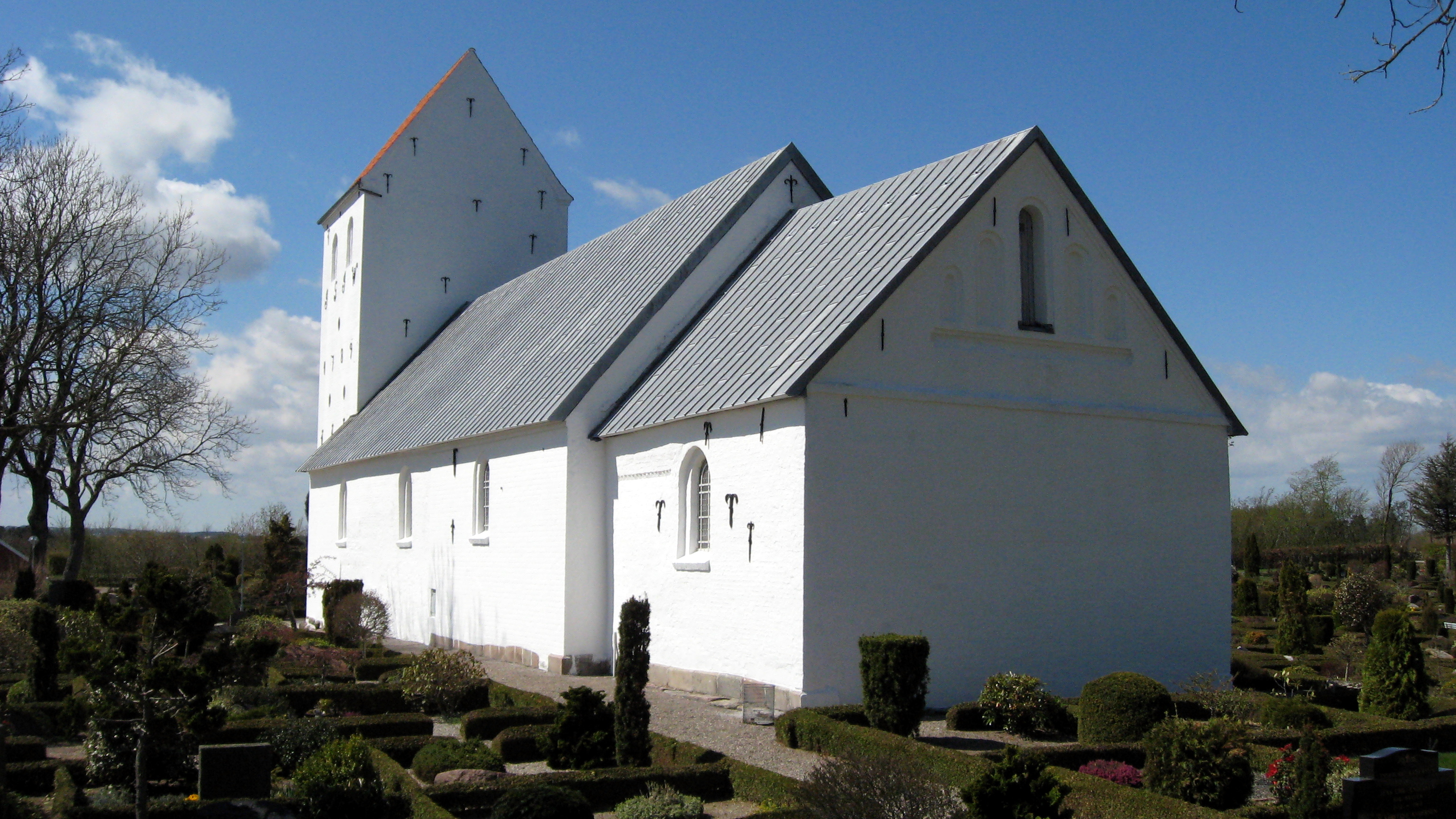 Skæve Kirke, Frederikshavn Kommune